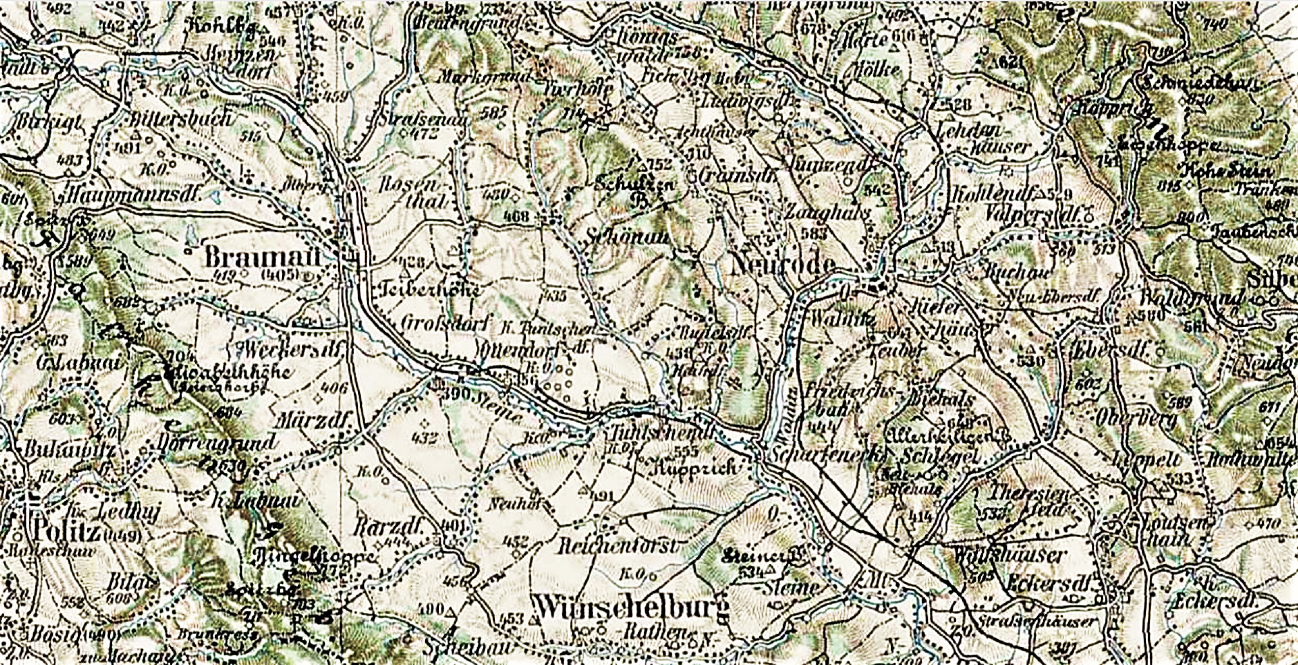 Nowa Ruda na austro-węgierskiej mapie sztabowej w skali 1:200 1910 r.